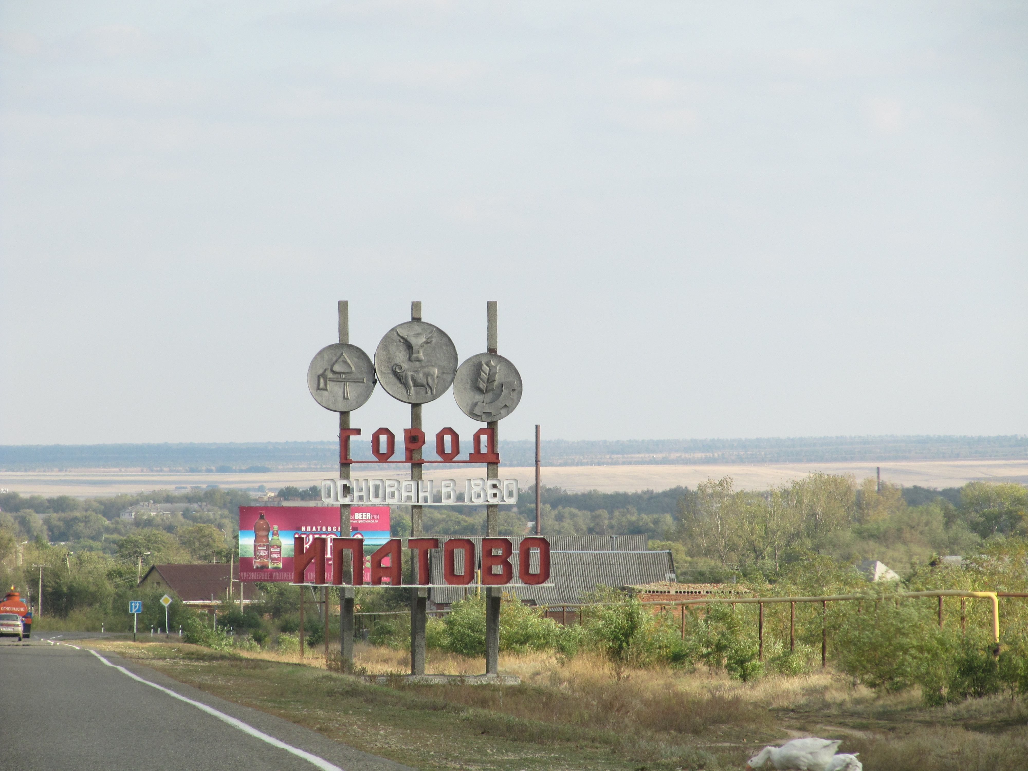 дорожный указатель, город Ипатово, Ставропольский край